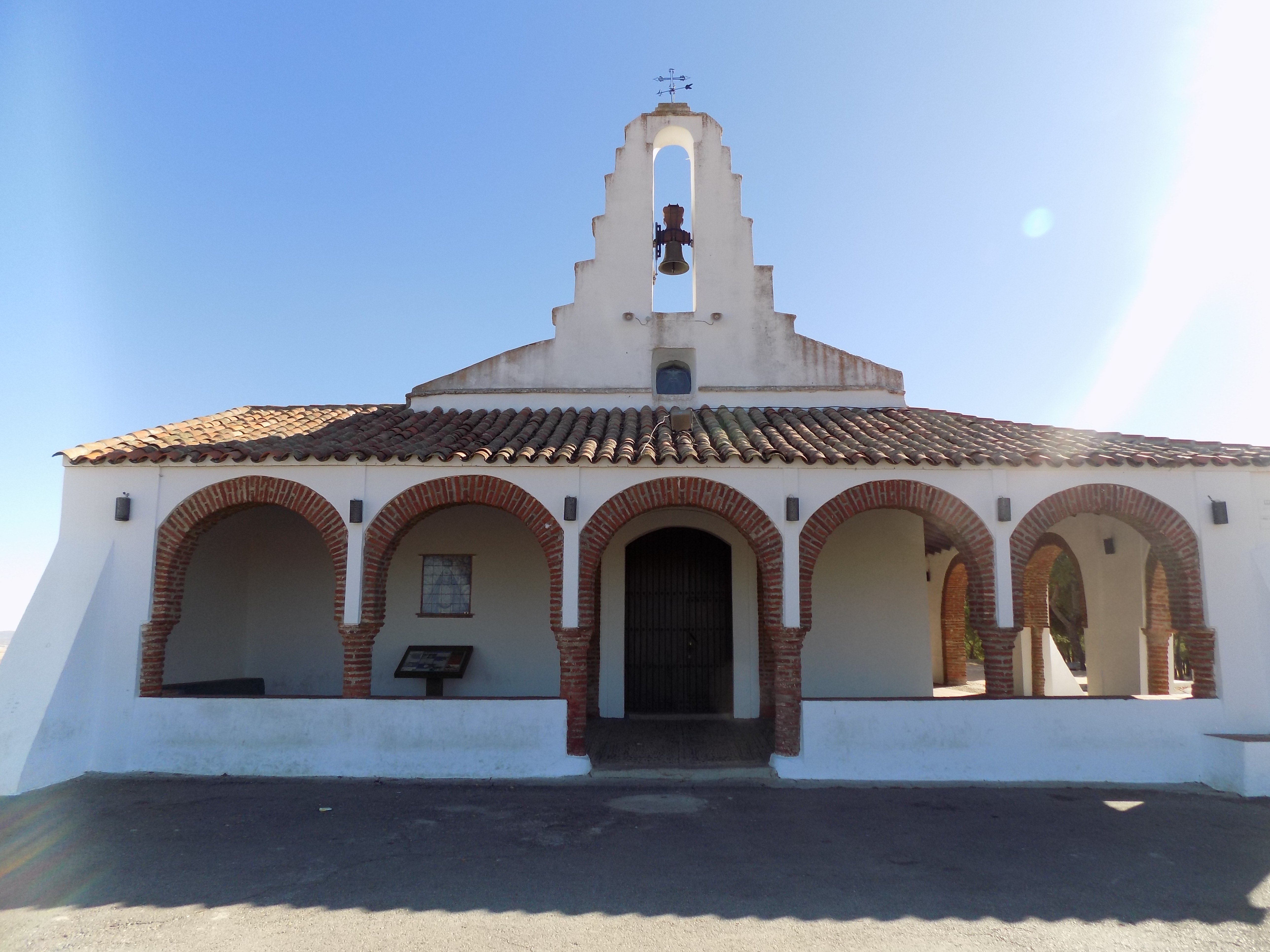 Fachada principal de la Ermita de Nuestra Señora de Gracia de Fuente Obejuna, en la provincia de Córdoba, (España).